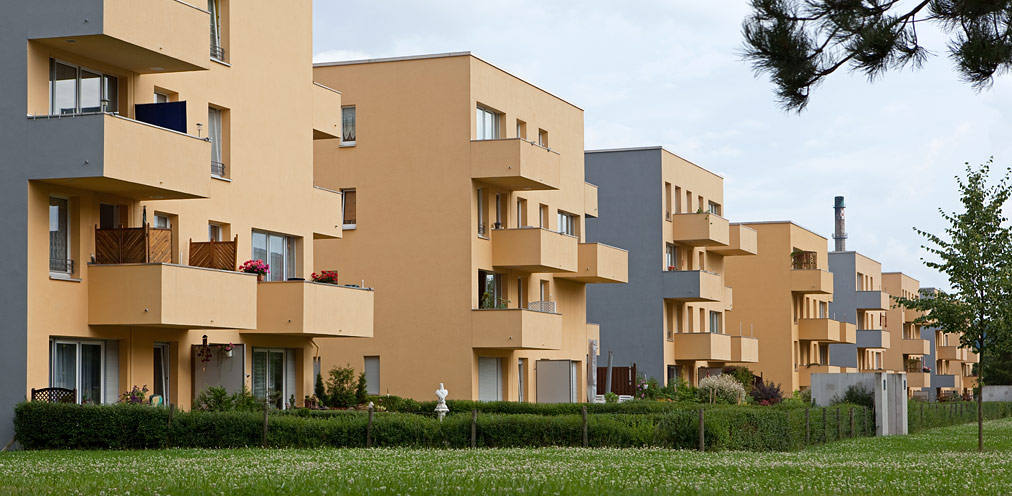 Die 8 Stadtvillen in der Einsteinstraße in Leinefelde-Süd, herausgeschält aus einem 180 Meter langen Plattenbauriegel (Stefan Forster Architekten). Fertiggestellt 2004.